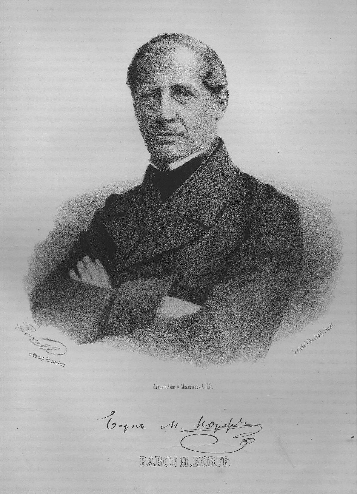 Корф, Модест Андреевич